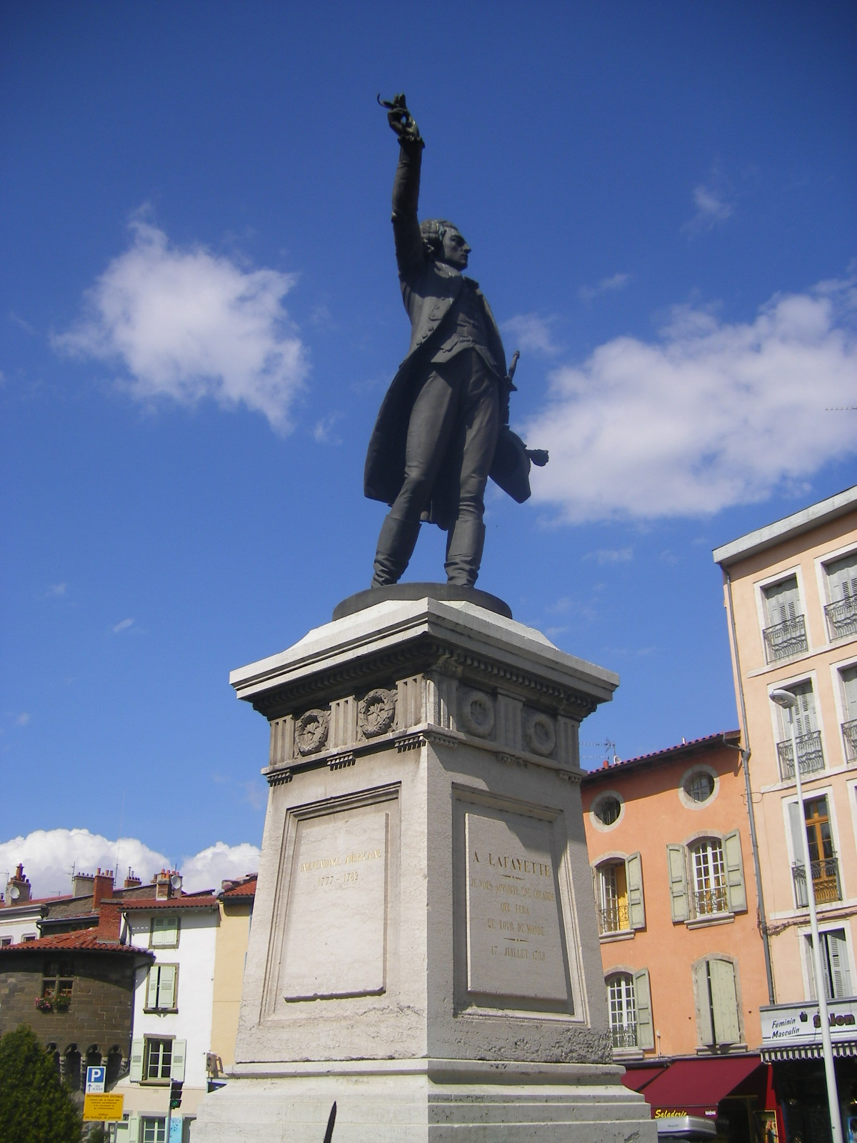 Statue of Marquis de La Fayette, Le Puy